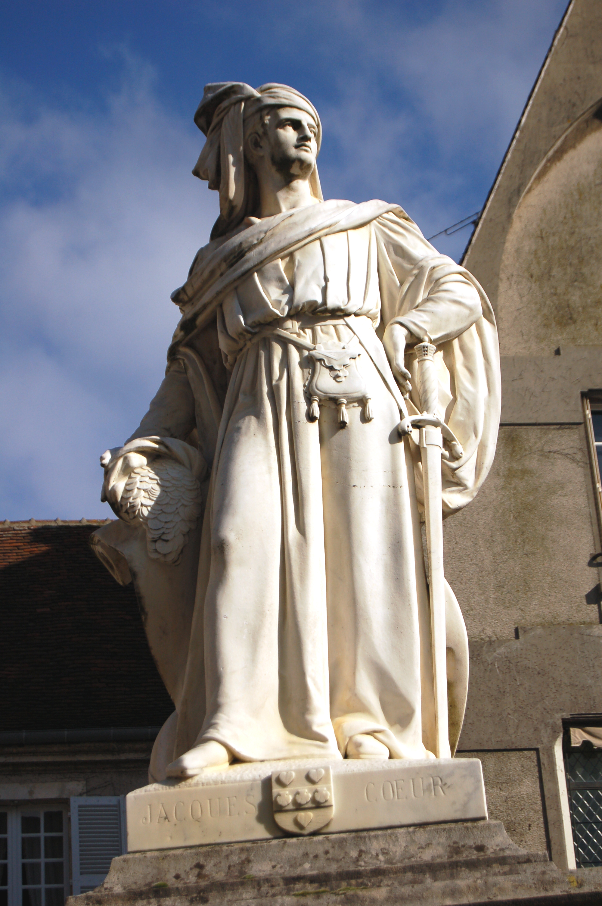 Statue de Jacques Coeur à Bourges